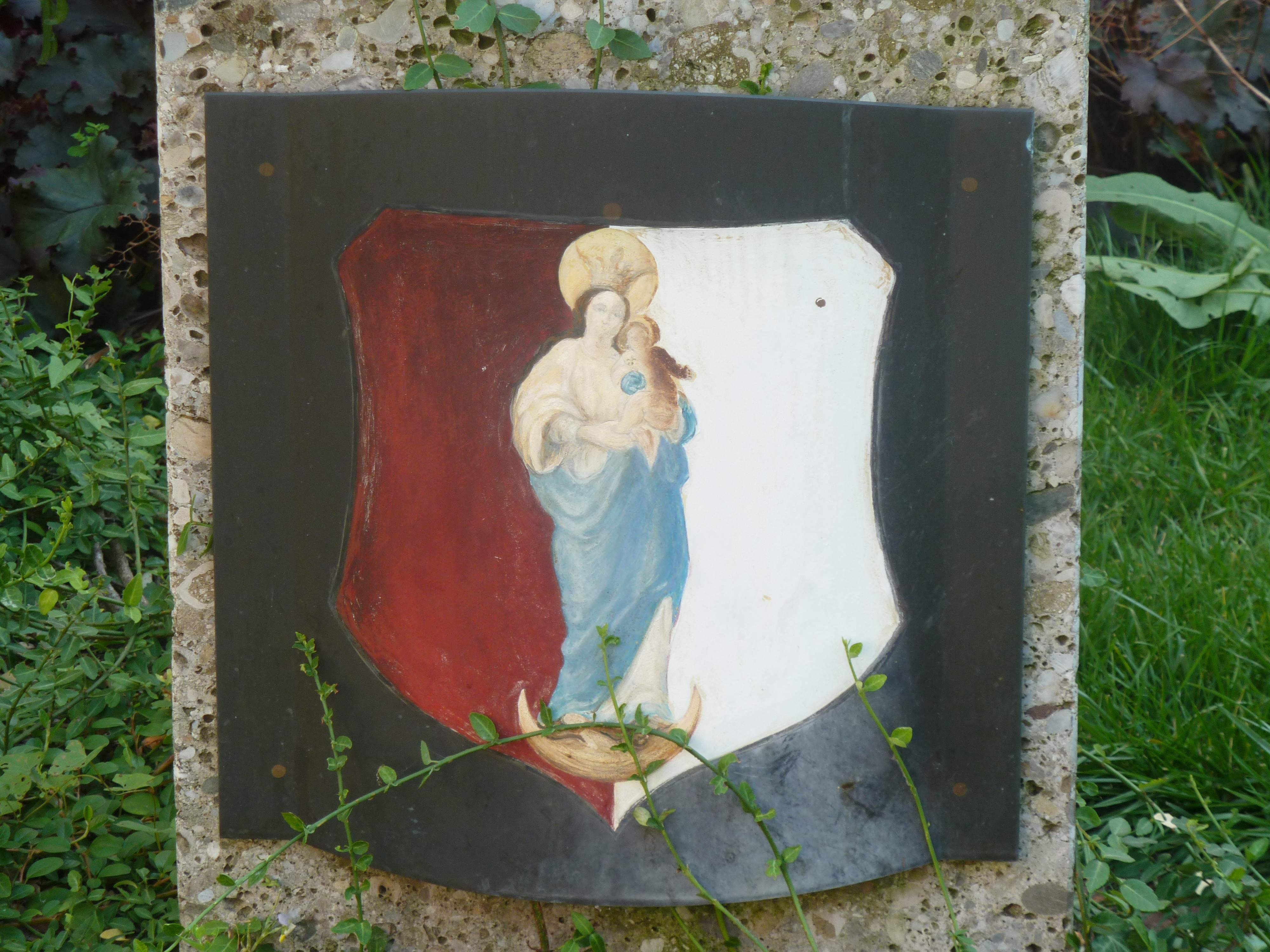 Vereinfachtes Wappen des Domstifts Augsburg, heute im Gebrauch des Domkapitels